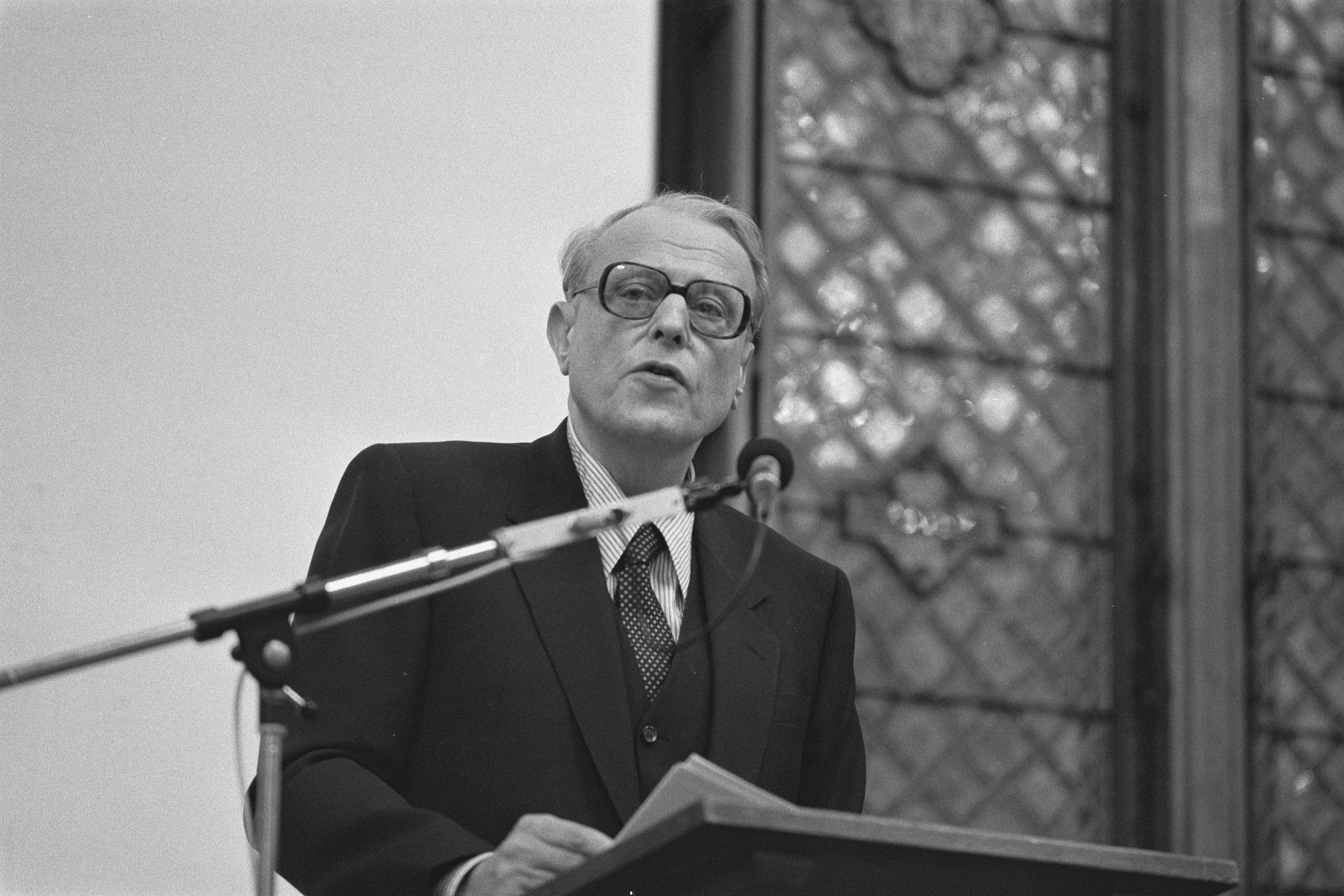 Schrijver W. F. Hermans spreekt op symposium over auteursrecht in Ridderzaal in Den Haag.